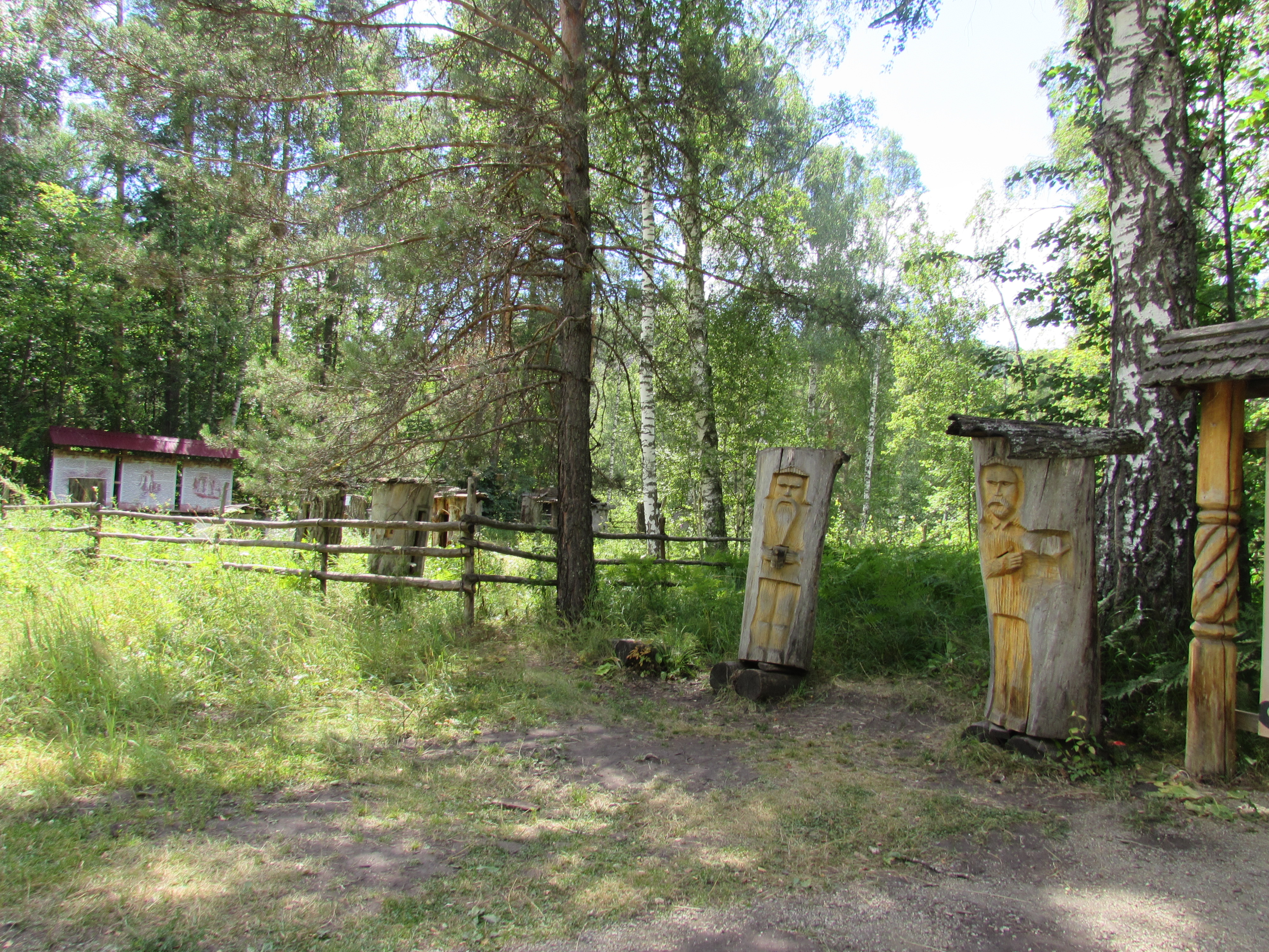 Башҡортса: Башҡорт викимедиасыларының Шүлгәнташҡа сәйәхәте